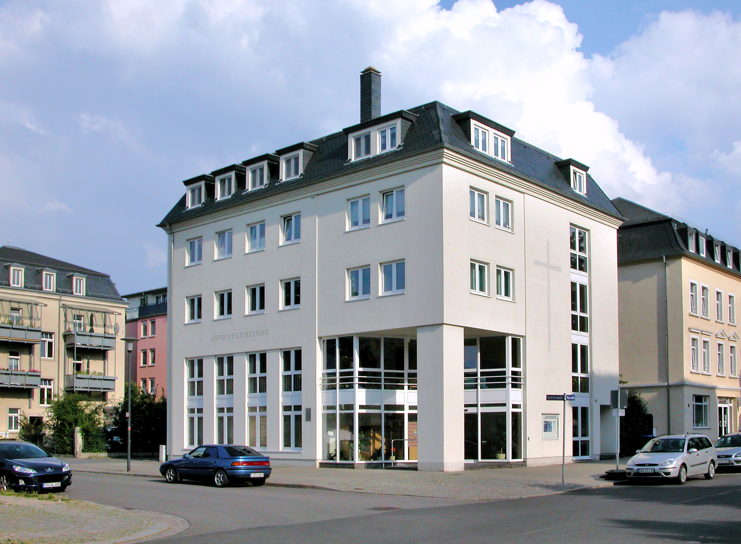 14.06.2008 01159 Dresden-Löbtau: Adventgemeinde Poststraße 13 (GMP: 51.042190,13.700262). [DSCN33069.TIF]20080614010DR.JPG(c)Blobelt